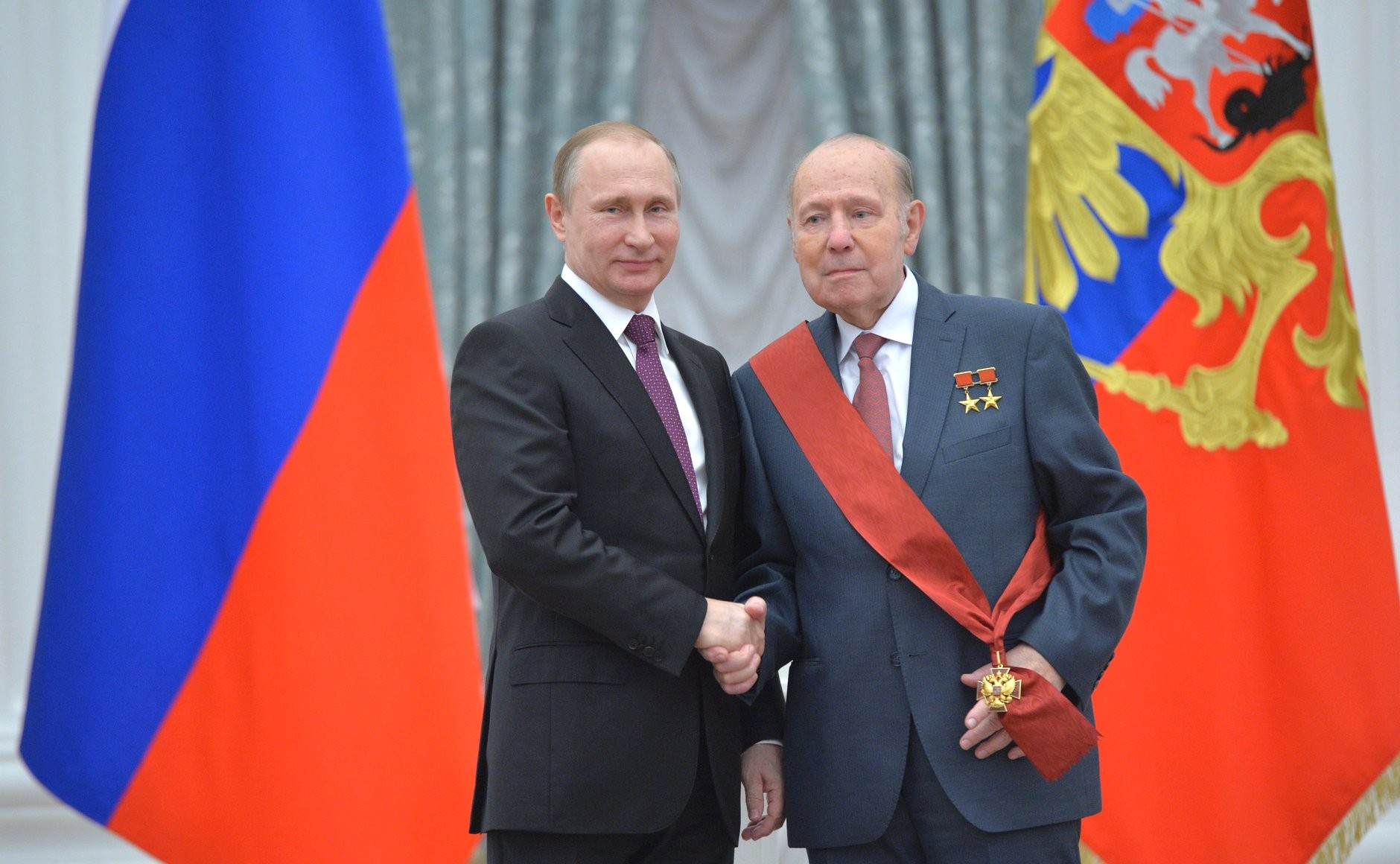 Церемония вручения государственных наград Российской Федерации. Орденом «За заслуги перед Отечеством» I степени награждён главный советник генерального директора по науке Авиационного комплекса имени С. В. Ильюшина Генрих Новожилов